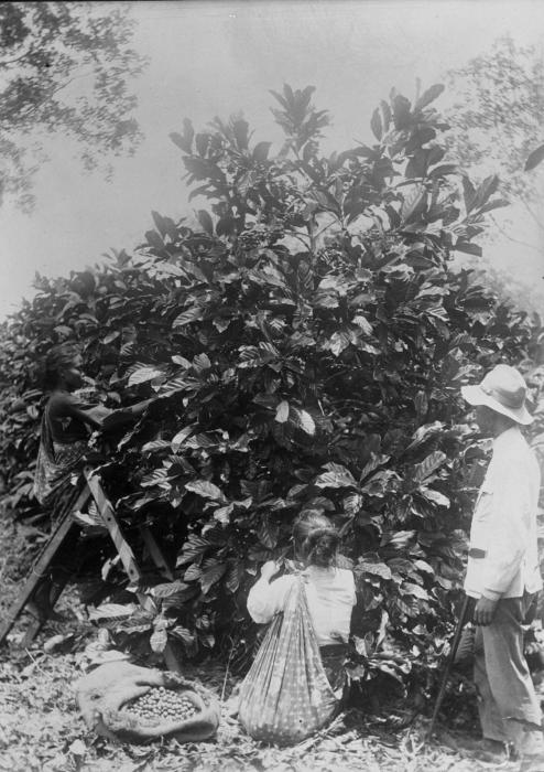 Negatief. Het plukken van koffie van een struik